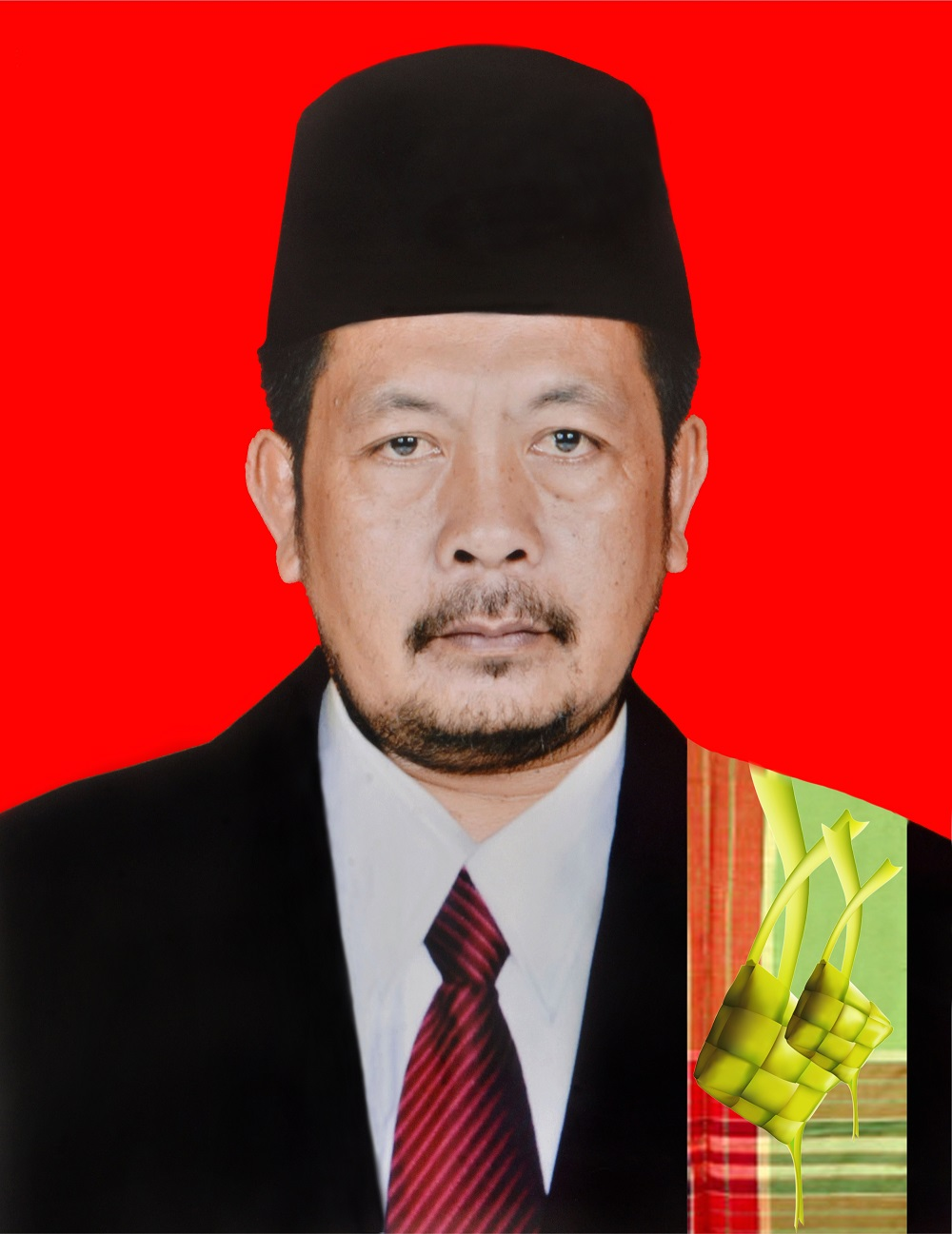 Kuwu Kejiwan Periode 2015 - Sekarang